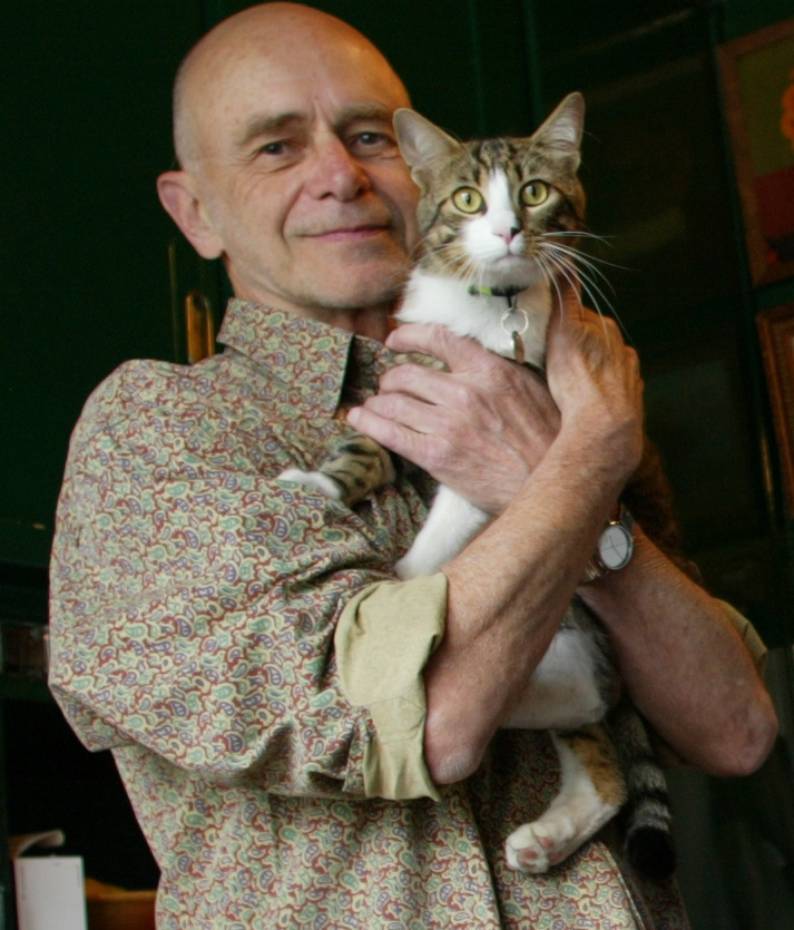 peinture d'Emilienne Farny, acryl sur toile, 100x100 cm